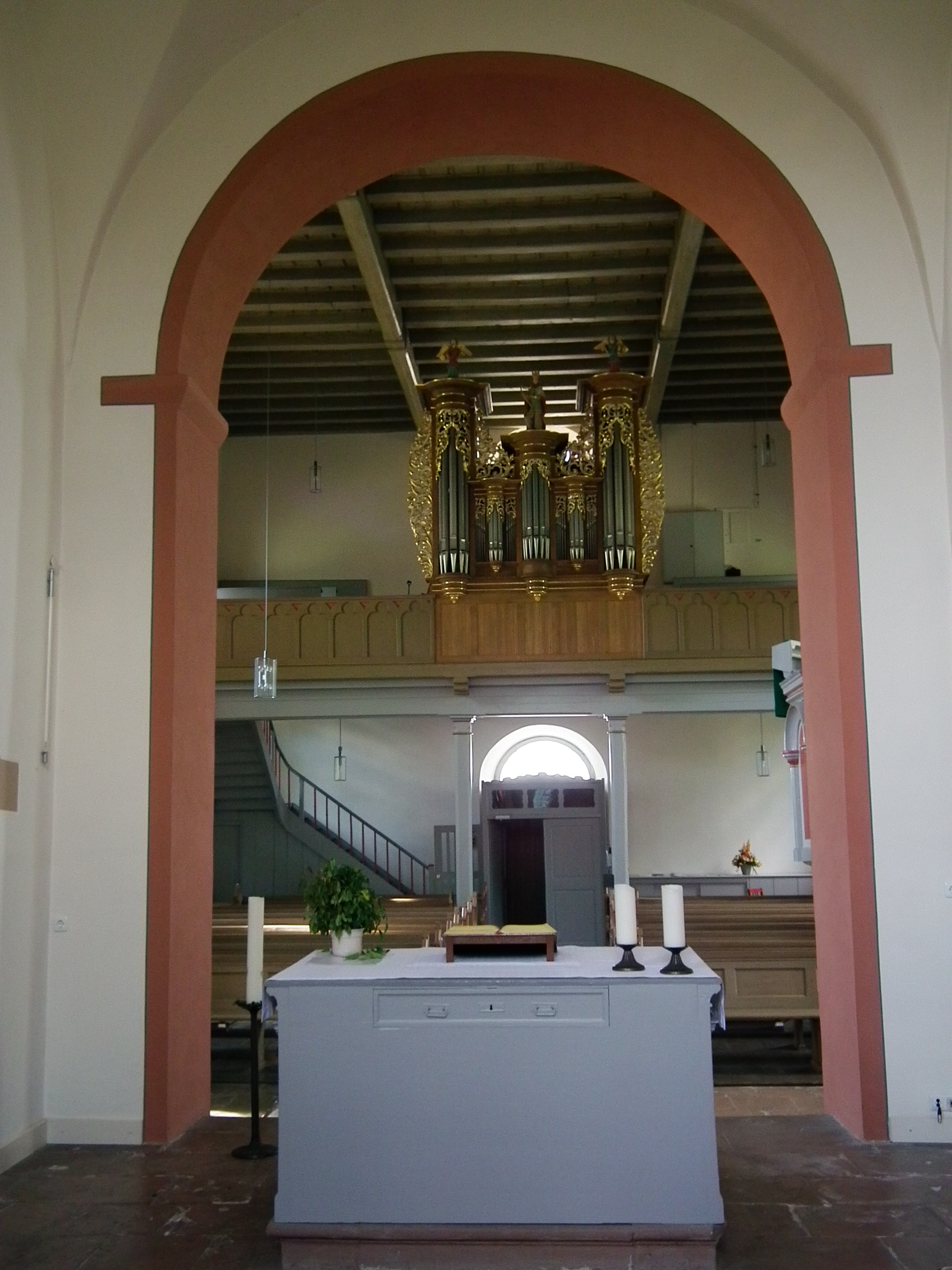 Evangelische Martinskirche in Waldlaubersheim (Rheinland-Pfalz, Deutschland); Blick in das Kirchenschiff auf die barocke Orgel der Gebrüder Stumm aus dem Jahr 1741